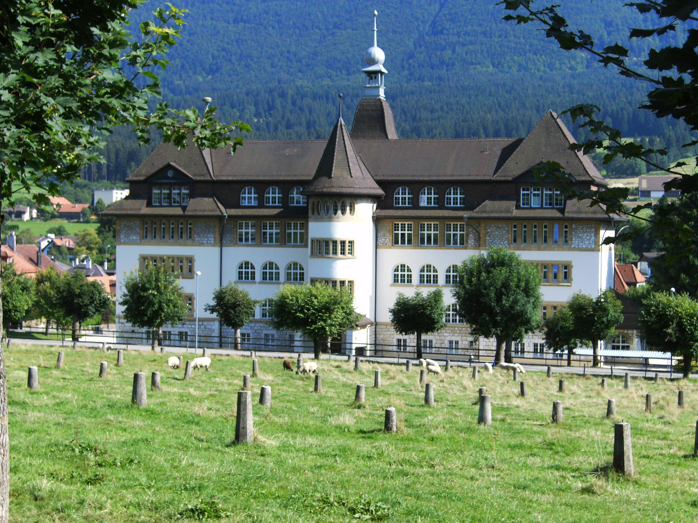 École primaire de la commune de Reconvilier (BE, Suisse). Prise de la photo depuis la halle de gymnastique, direction sud.